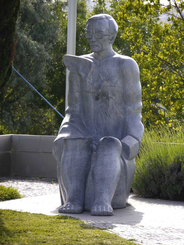 parquepoetas_1000030